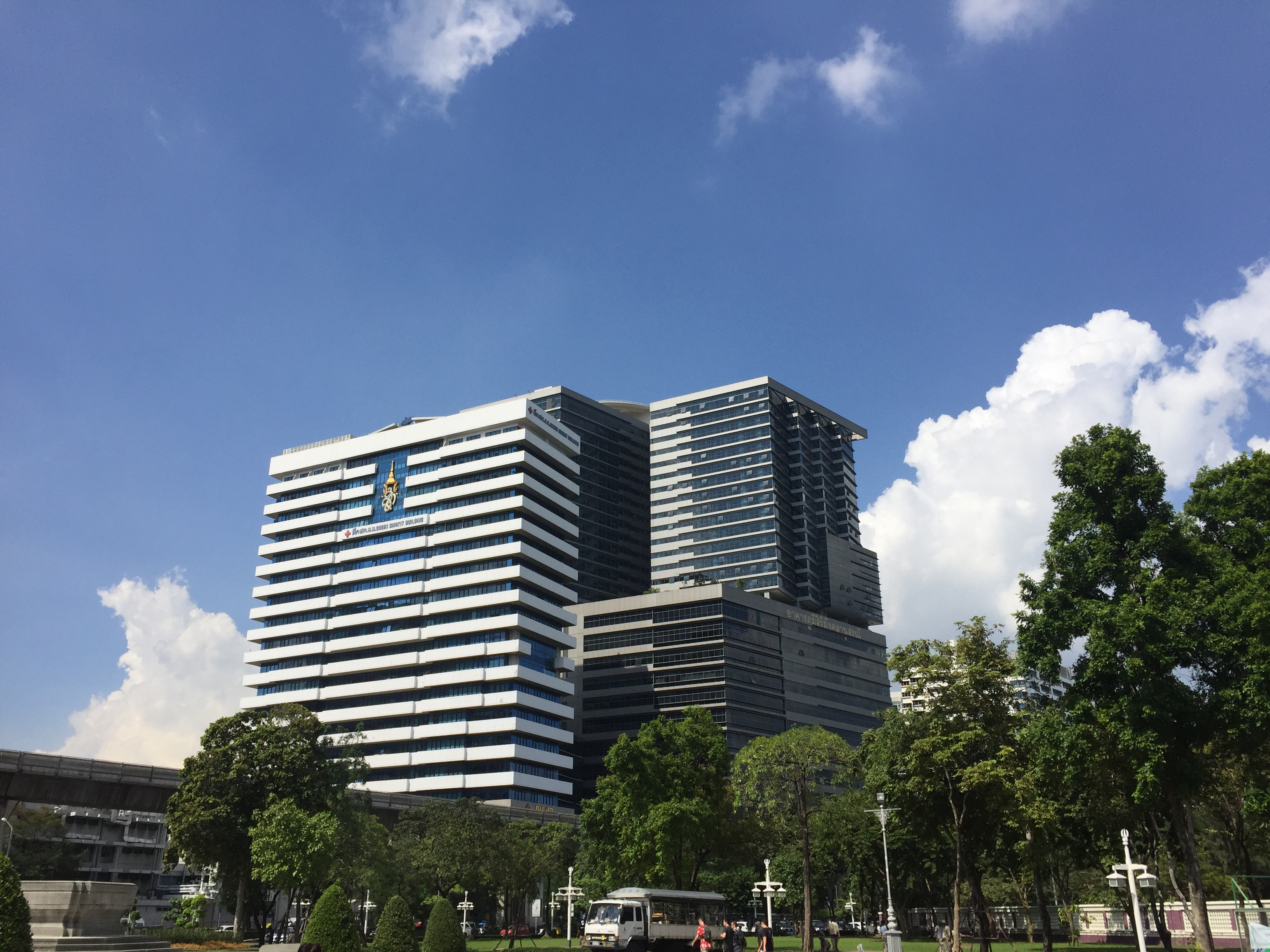 อาคาร สก.